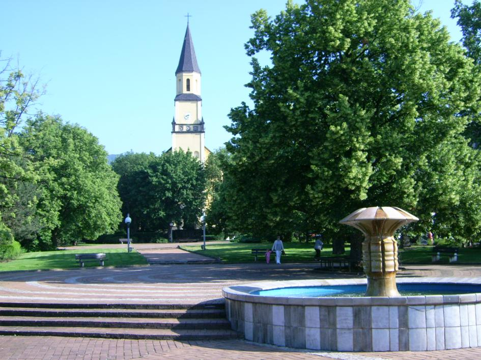 Bezejmenné hlavní náměstí podél Krušnohorské ulice v Chlumci u Ústí nad Labem.